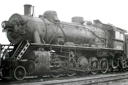 A China Railways DK1(Mantetsu Dekai).